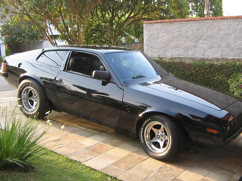 1980 Puma GTB S2